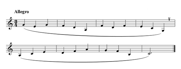 Srpskohrvatski / српскохрватски: Note kompozicije:Razigrani akordi